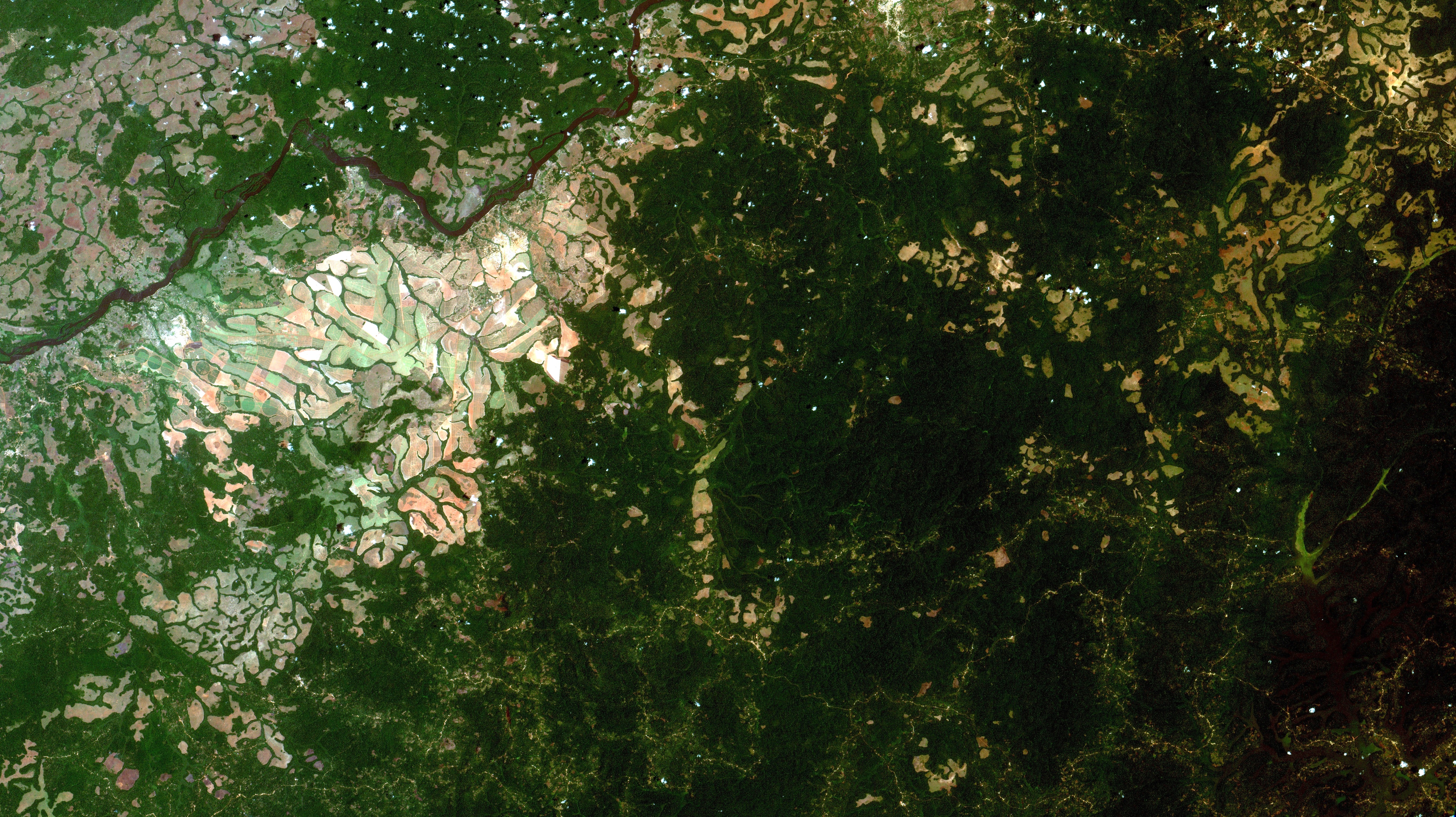 Mbandjock, Centro de Camarões. Ás margens do Rio Sanagá, em preto, cruzando a imagem de Leste a Oeste, sua principal atividade econômica são os plantios de cana-de-açúcar da Société Sucrière du Cameroun, subsidiária da multinacional Francesa SOMDIAA. Área urbana em branco, à esq. da imagem ao sul do rio. Plantações em verde claro e em laranja quando com solos expostos. Savana arbórea densa em verde escuro. Campos de savana em cinza avermelhado / M´Bandjock, Cameroon Center. By the Sanagá River, appearing in black crossing image from East to West, its main economic activity are Société Sucrière du Cameroun, SOMDIAA French multinational affiliate, sugarcane plantations. Urban area in white at image left, south of river. Plantaions appear in light green and in orange when with exposed soils. Dense woody savanna in dark green. Grassland savanna in redish gray. Mbandjock #camarões #cameroun #cameroon #kamerun #hautesanaga #sosucam #somdiaa #agronegocios #agrobusiness #sugarcane #canadeaçúcar #savannas #savanas #afrique #africa #áfrica #sécuritéalimentaire #agriculture #agricultura #sensoriamentoremoto #remotesensing #cbers4 #cbers #inpe #geotecnologias Imagem / Image CBERS4 MUX Plantações de cana-de-açúcar em / Sugarcane plantations at Mbandjock, Camarões Coordenadas do centro da imagem / Image center: 4°29'21.3"N 11°58'28.4"E Data / Date: 05-03-2019 / 2019-05-03 RGB 765 (cor verdadeira / true color) Cena / Scene: 100 / 095 Autor / Author: Oton Barros (DSR/OBT/INPE) Imagem em HD / HD Image Visite-nos / Visit us